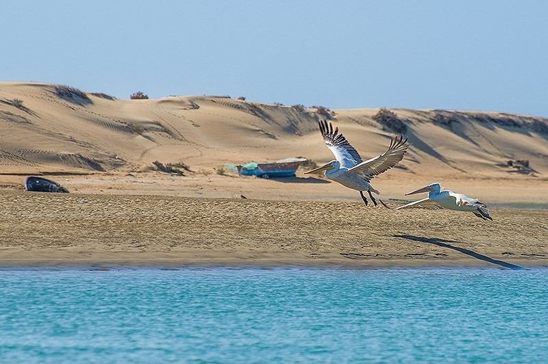 بندر تنگ سیستان و بلوچستان بندر تنگ بخش کوچکی است در شهر چابهار که به دلیل تلاقی کویر و دریا در این منطقه جذابیت های ویژه ای به وجود آمده که جلوه ی بی نظیری را به این روستا بخشیده است. شهرستان کنارک که در جنوب شرقی ایران و در سواحل زیبای دریای عمان قرار گرفته است، از دیرباز با اسکله صیادی بزرگ و فعالش یاد می‌شود. جاذبه های طبیعی بکر و بی نظیری در این بخش کوچک بندری وجود دارد دل هر گردشگری را می برد.سواحل شنی و ماسه ای و صخره ای وجود درخت انجیر معابد و تپه های گل افشان از جاذبه های این بندر بی نظیر است.